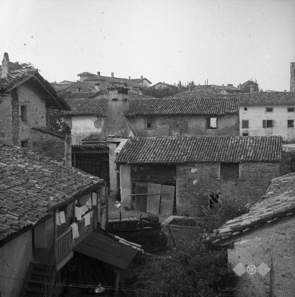 Hiše v Kozani.